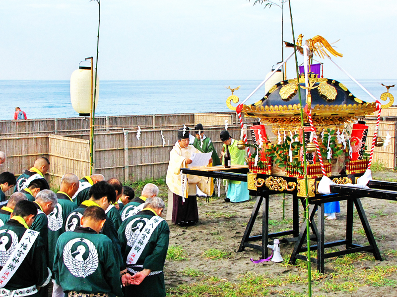 浜祭典の様子